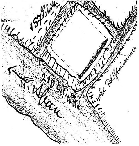 Sabile linnuse asendiplaan. Üleval on põhjasuund. Tundmatu baltisaksa ajaloouurija joonistus